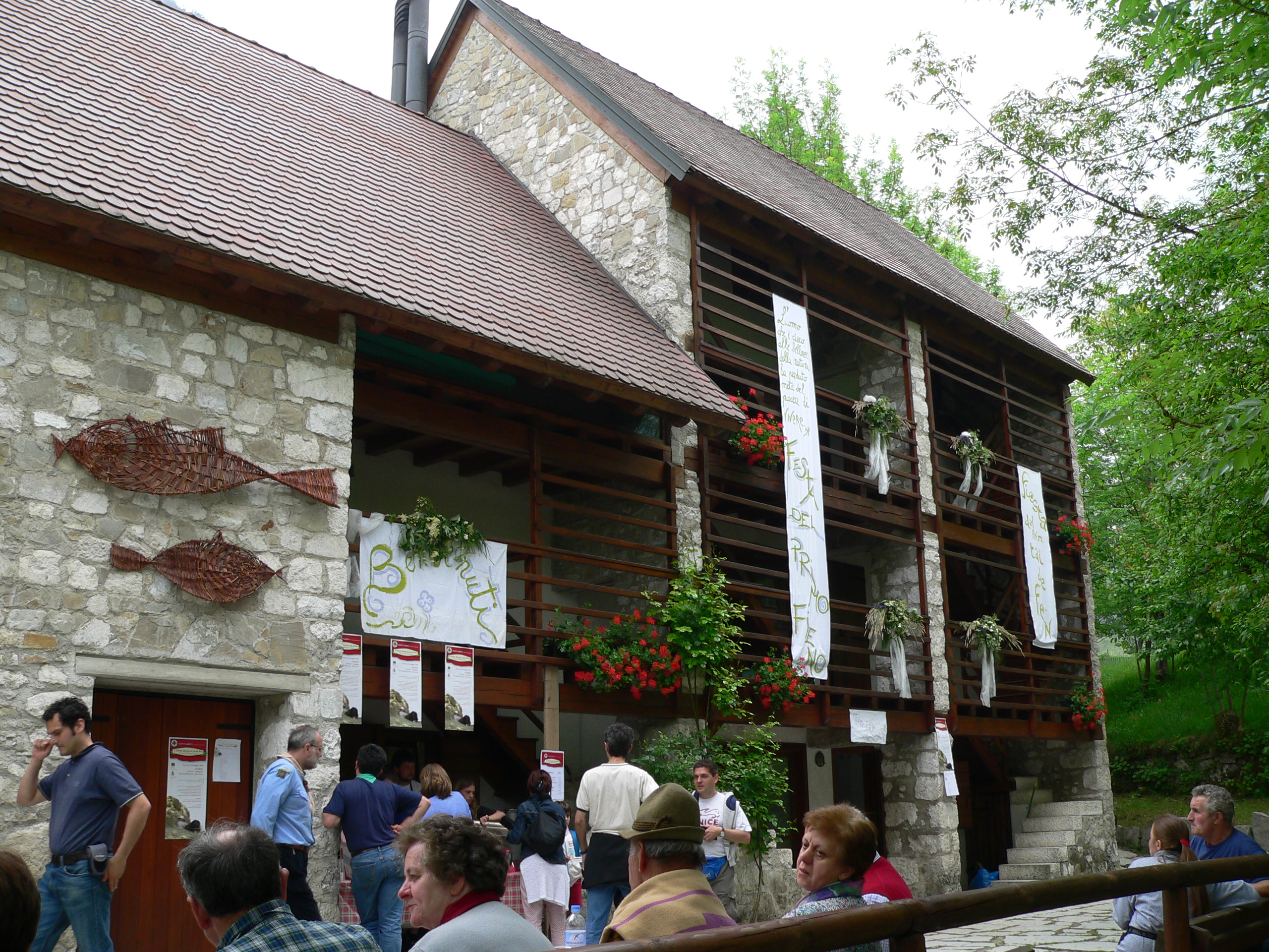 Skavtski center Andreis